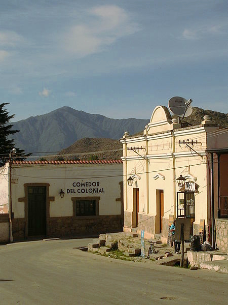 Calle de la localidad de Tafí del Valle (Argentina)